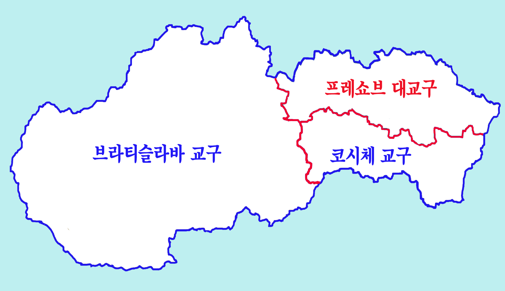 슬로바키아 슬로바크 전례 교구도